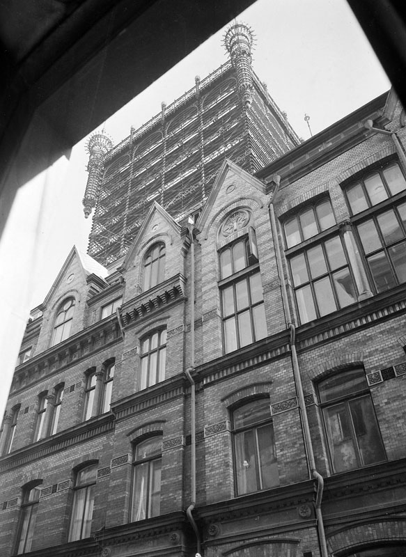 Telefontornet vid Malmskillnadsgatan 32